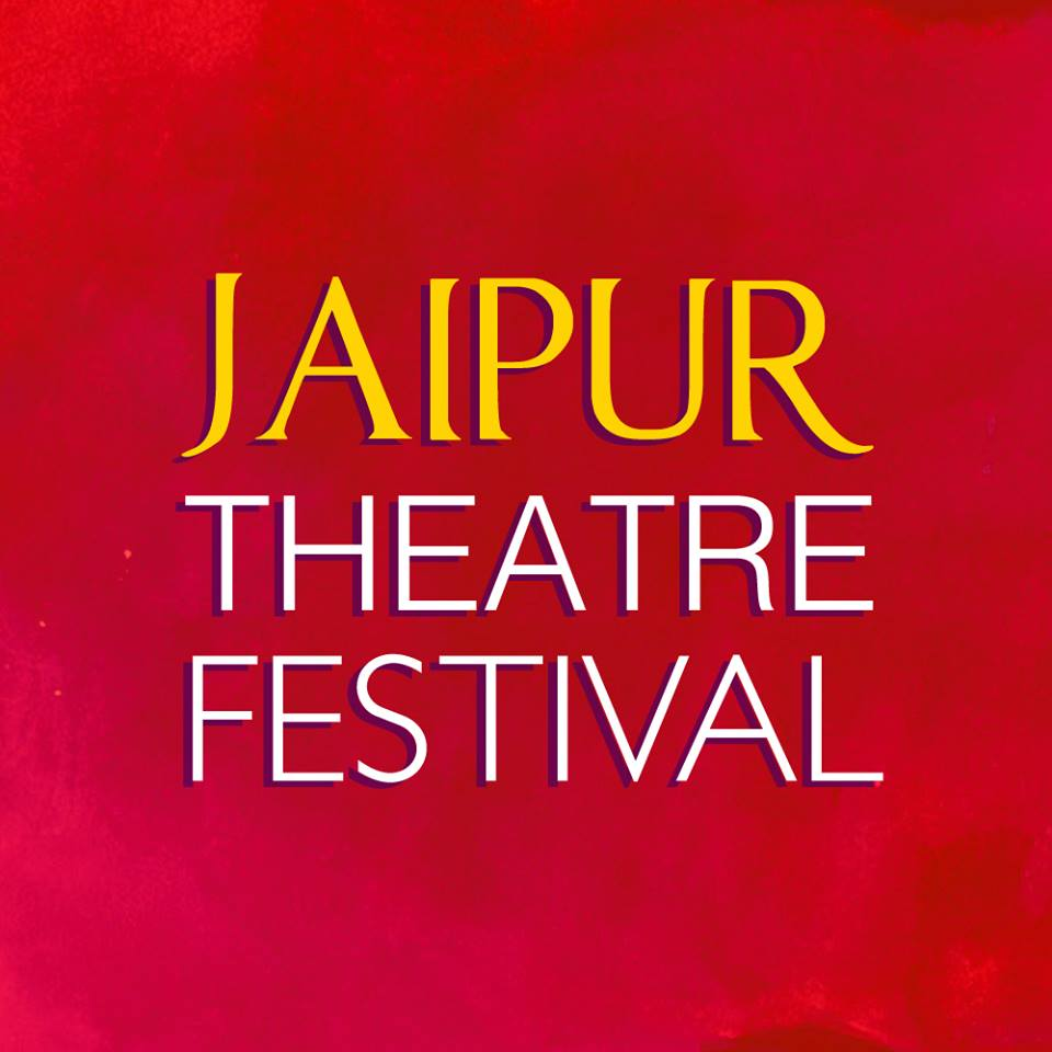 jairangam photo